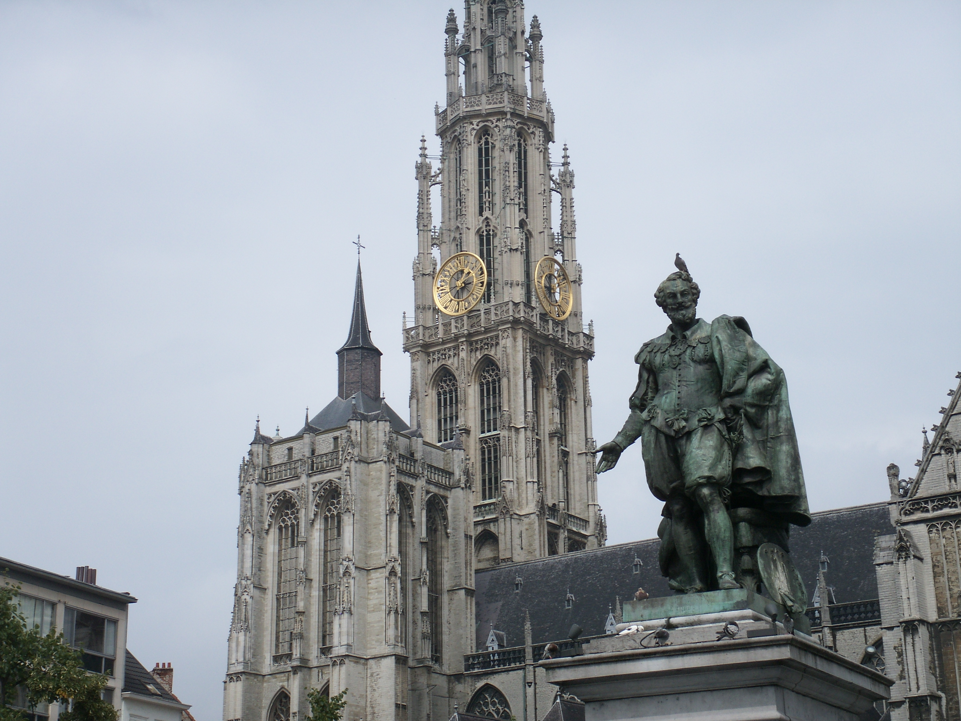 Liebfrauenkathedrale (Antwerpen) mit Rubensdenkmal